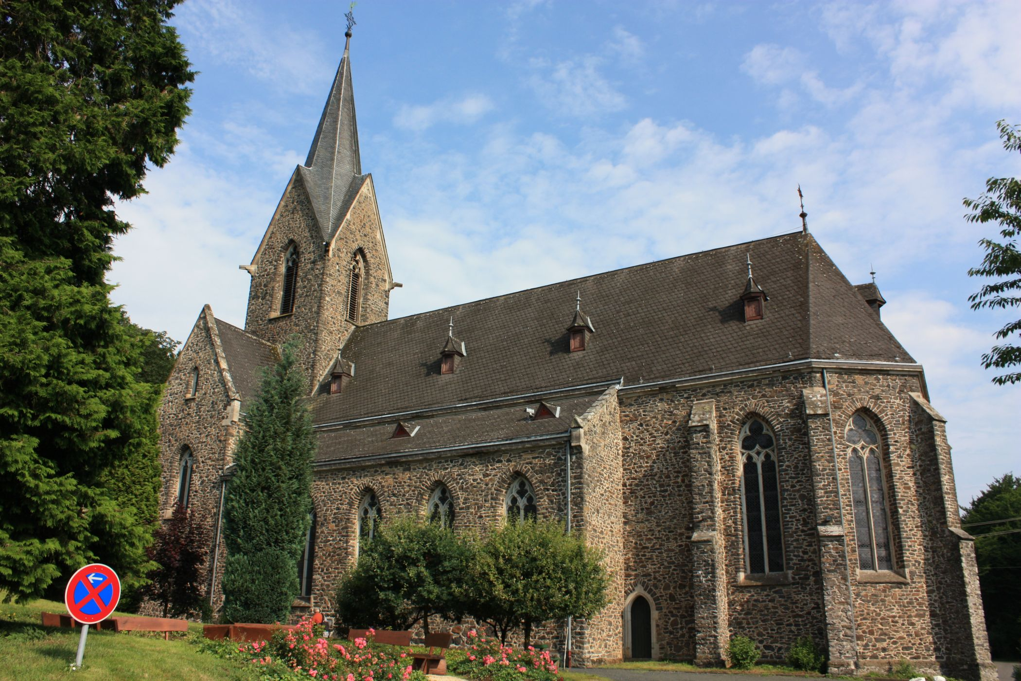 Liebfrauenkirche, Westerburg (erbaut 1898)